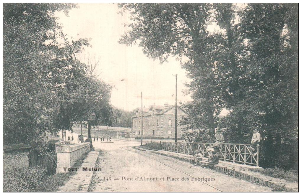 Rue des Marais à Melun ; on y aperçoit les rails du tramway, avant 1908.